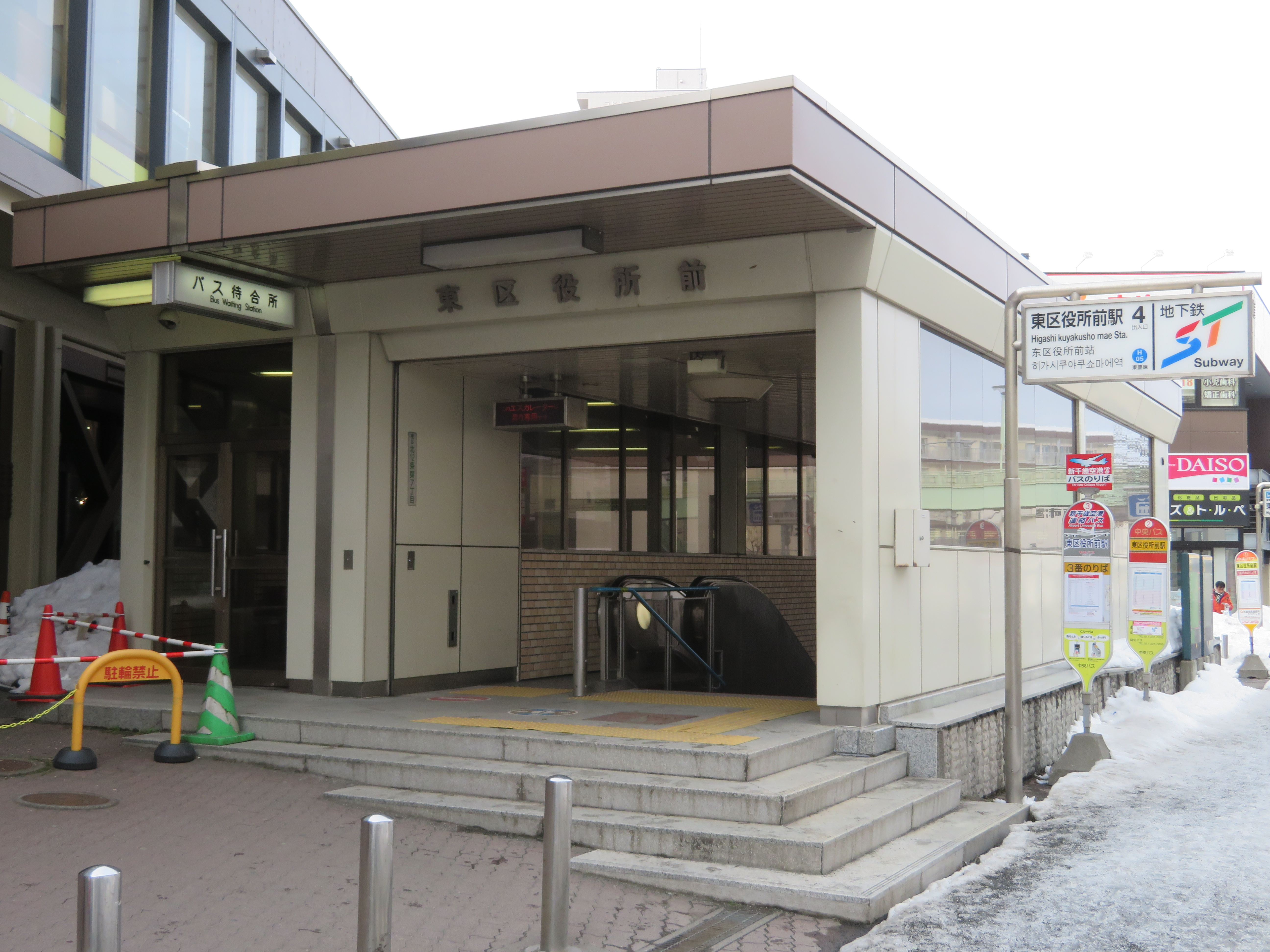 東区役所前駅4番出入口 Canon PowerShot SX720 HS